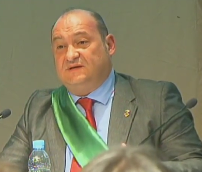 Carlos Ruiz Novella, alcalde de Viladecans